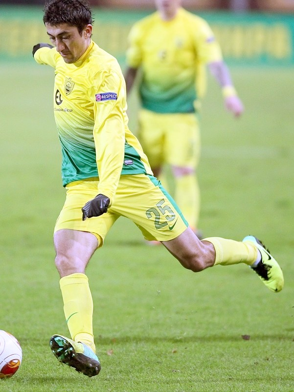 Одил Ахмедов игрок ФК Анжи